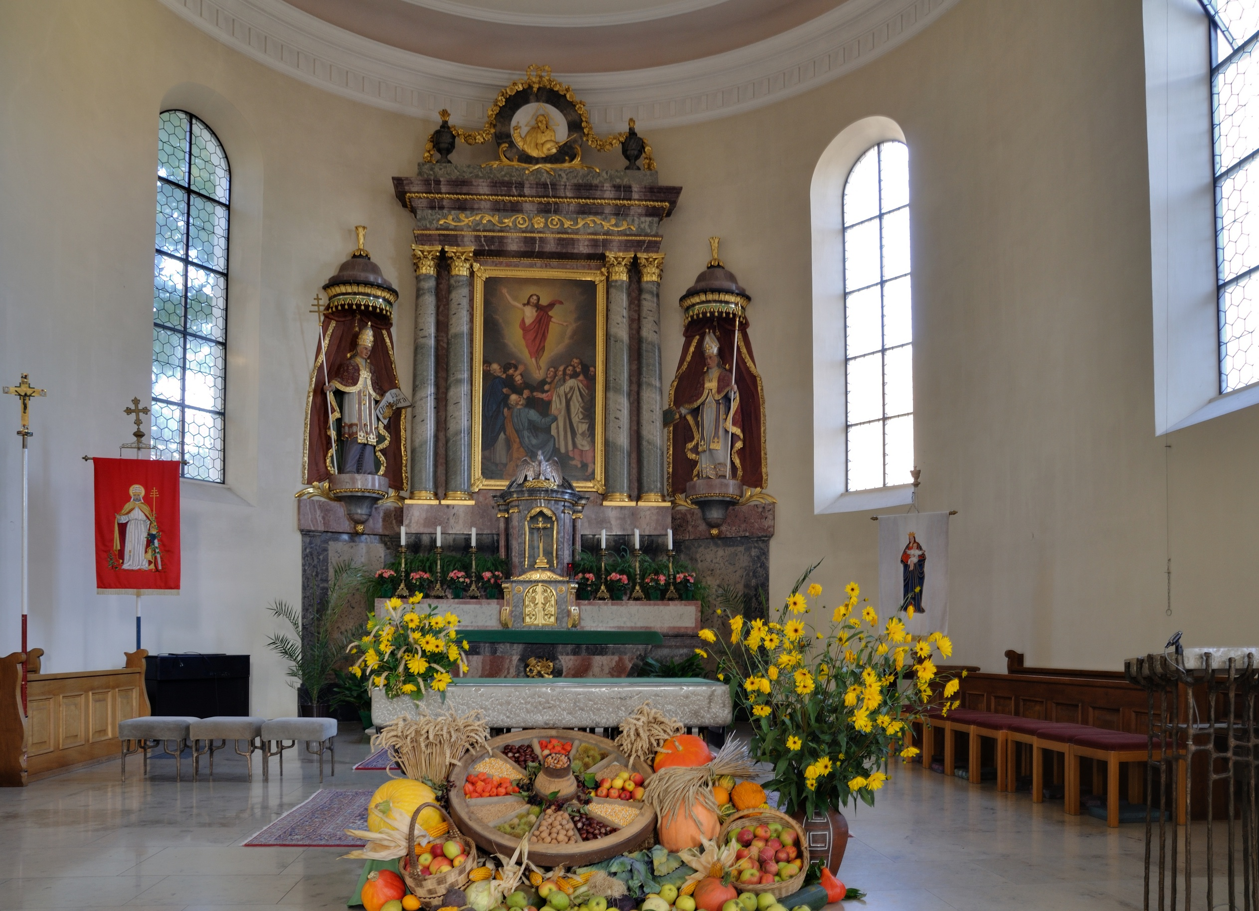 Rheinfelden-Herten: St. Urban, Chor und Hochaltar